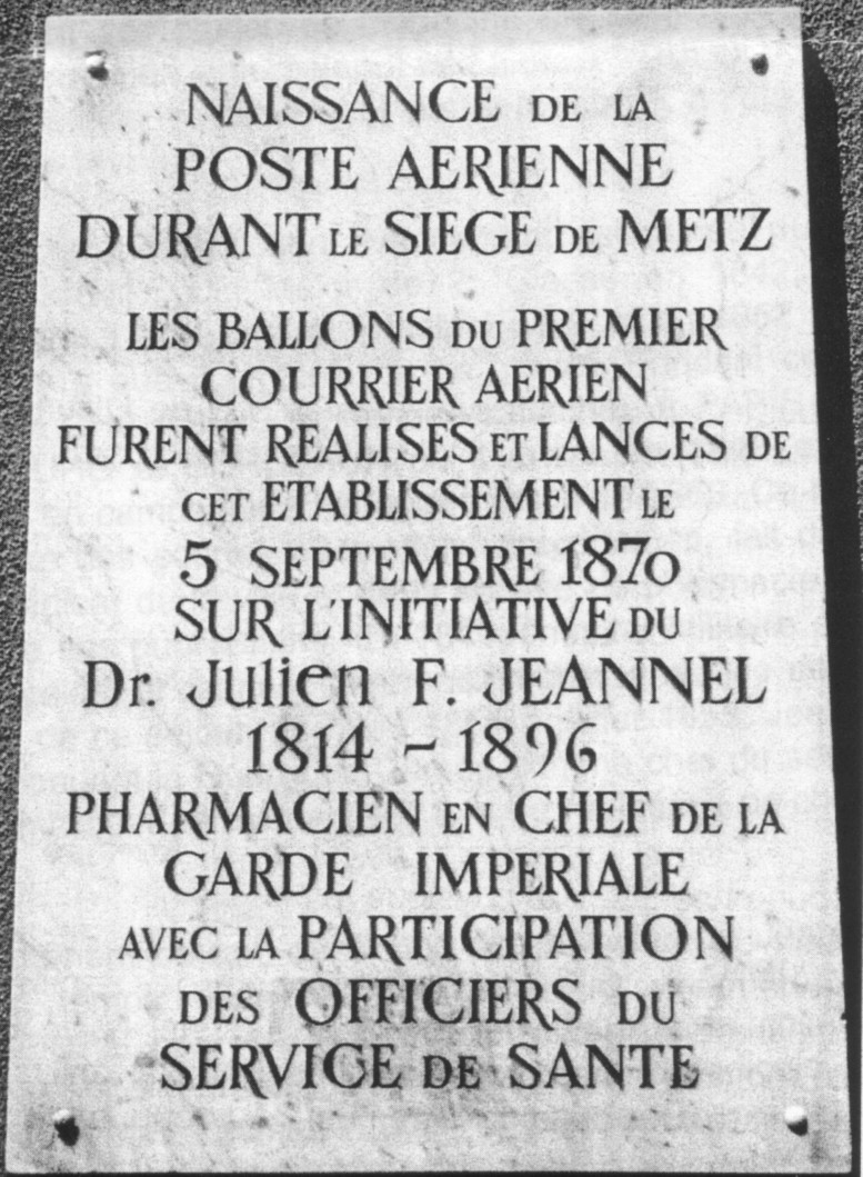 Julien-François Jeannel, photographie de la plaque commémorative des « Papillons des pharmaciens » lancés à Metz le 5 septembre 1870